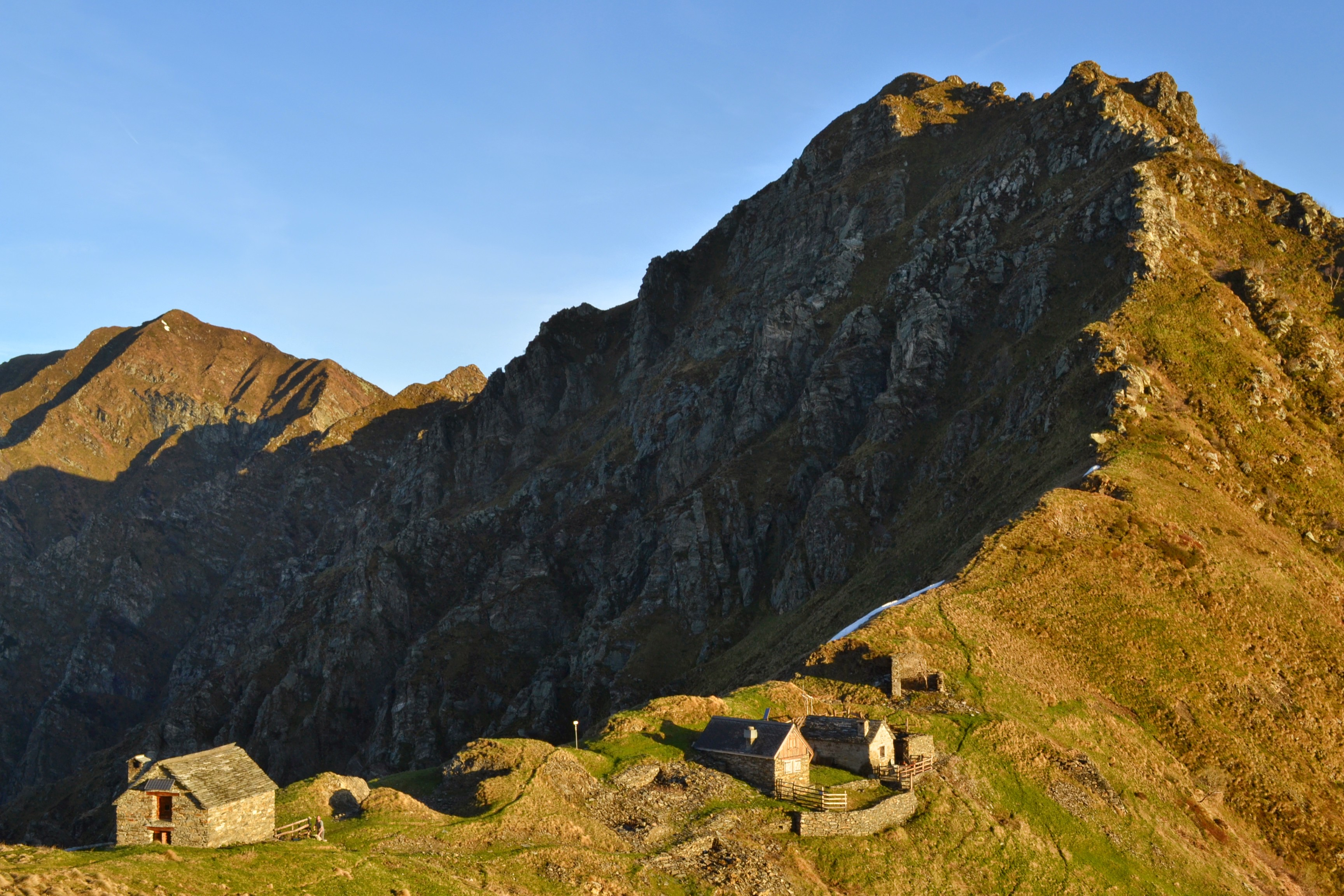 "Sulla coda del drago" - Bivacco La colma di Premosello - Parco nazionale della Val Grande (Q358729)